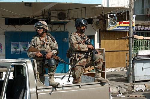 Two Iraqi Army soldiers stay alert for suspicious activity near an Adhamiya, Iraq voting site Oct. 15, 2005 as part of their security operations to keep polling locations safe while citizens around the country cast a vote in the historic referendum process.